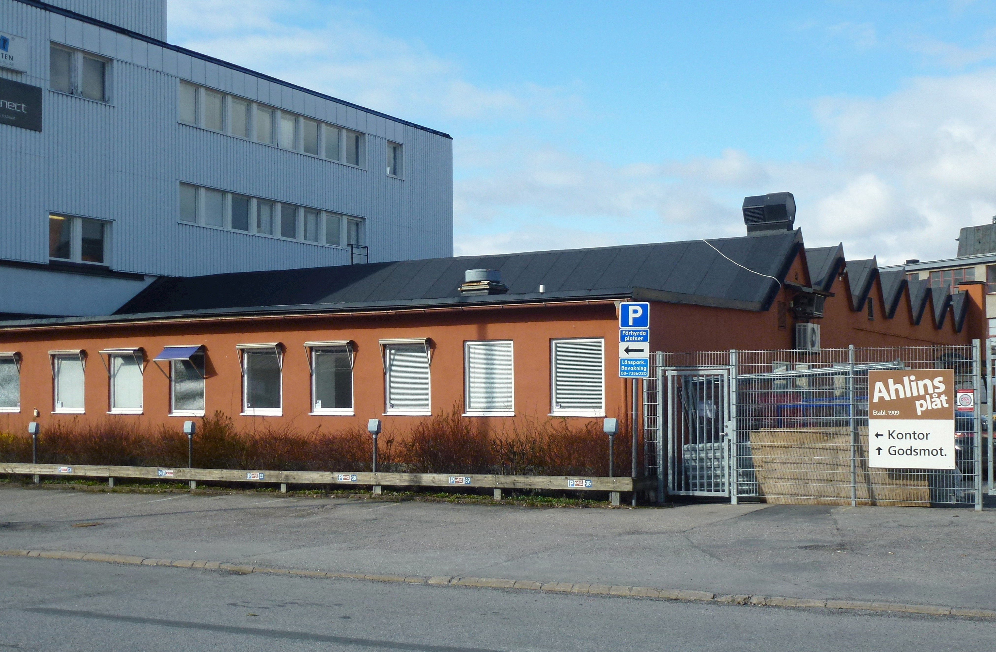 Hägerstens industriområde, Instrumentet 18, lågdel ursprungligen ritad av Nils Tesch och LM Giertz (1942 - 1943)